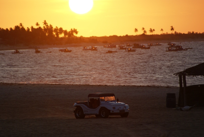 Praia, São Miguel do Gostoso